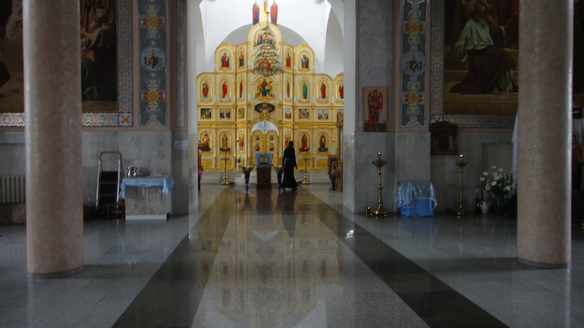 Собор Знаменский (руины) (Липецкая область, Елец, рабочий городок "Каменная гора")